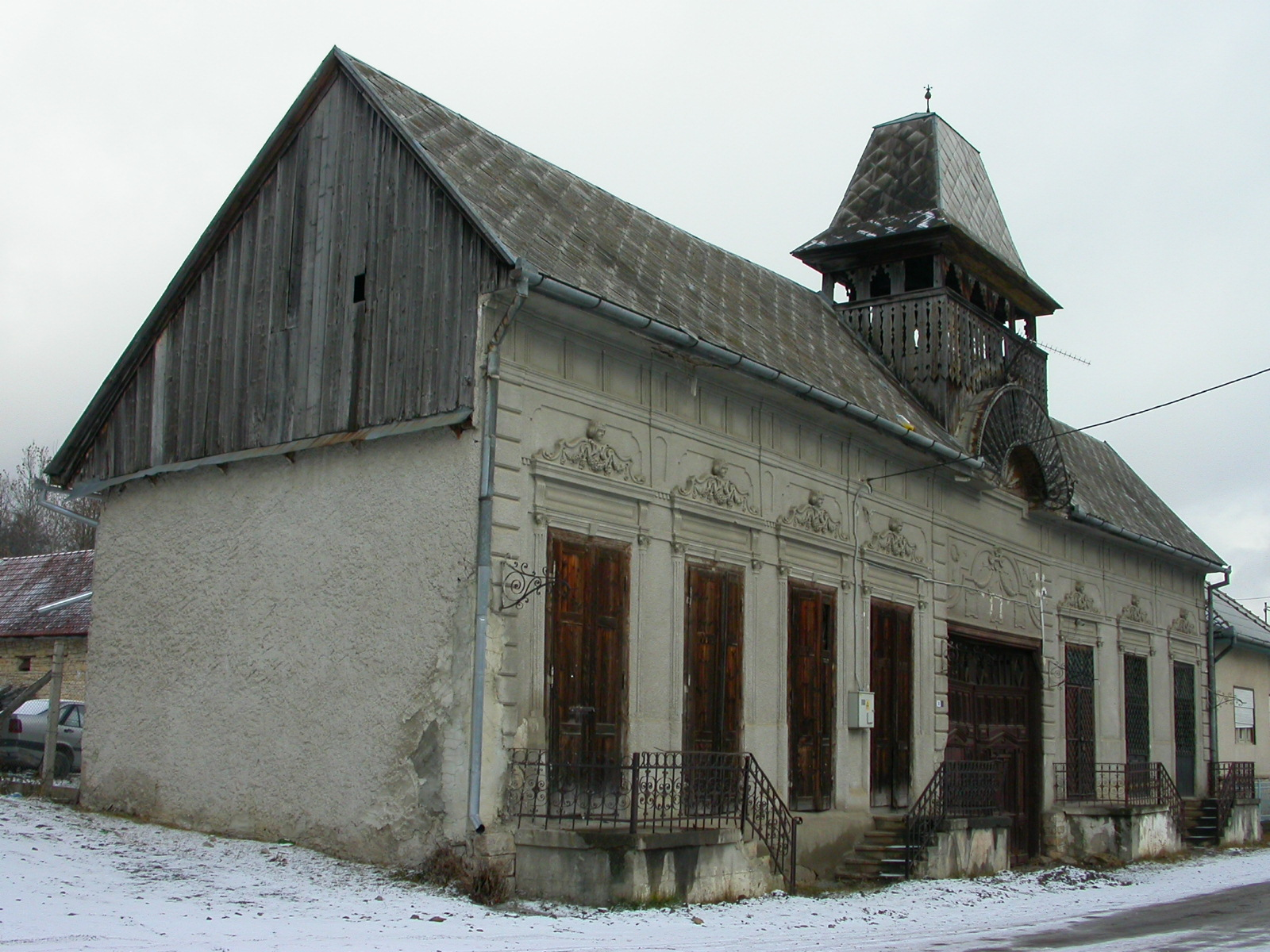 Conacul Kornis, sec. XIX